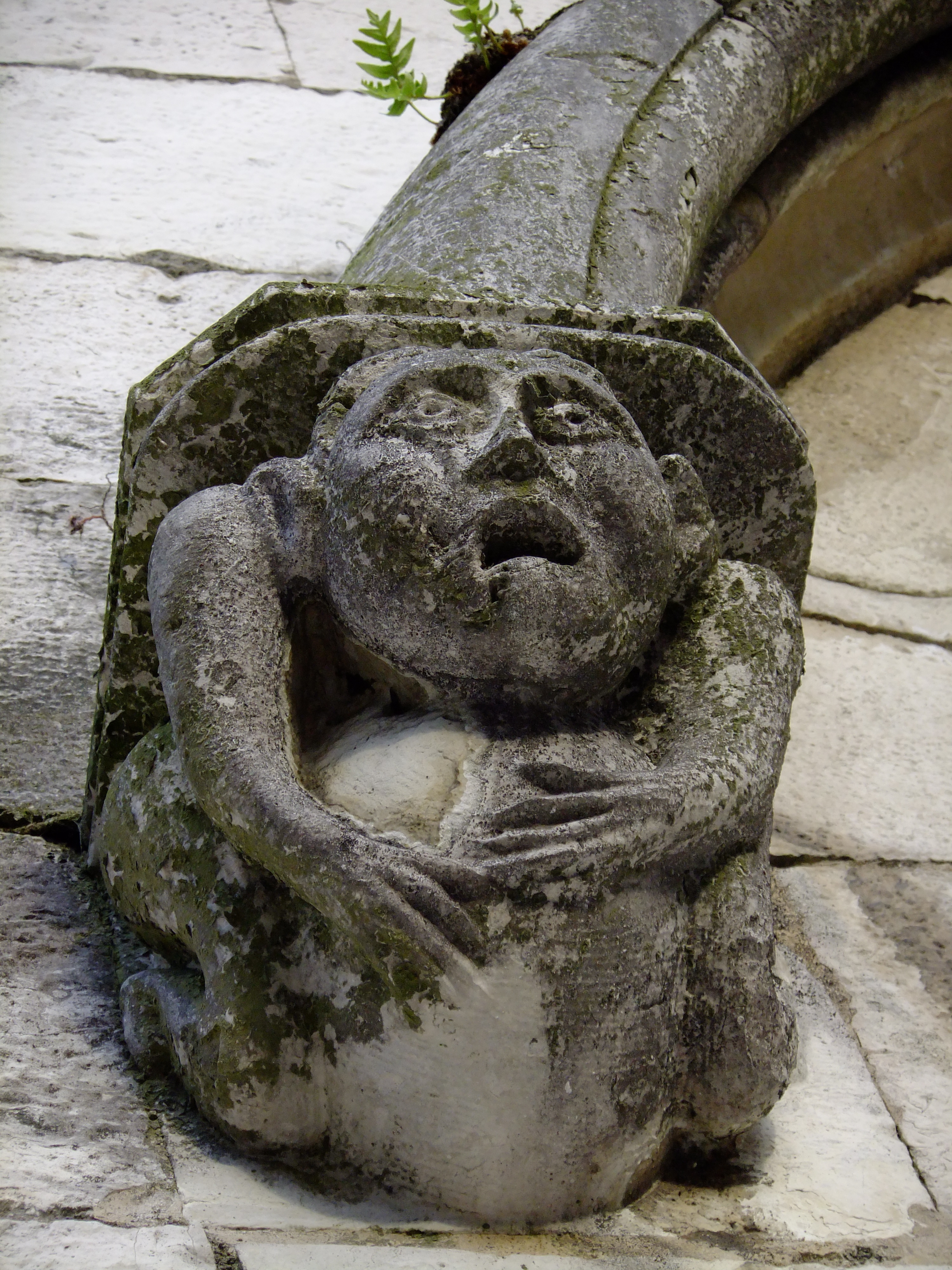 Peduccio di sinistra di una finestrella della Cattedrale.